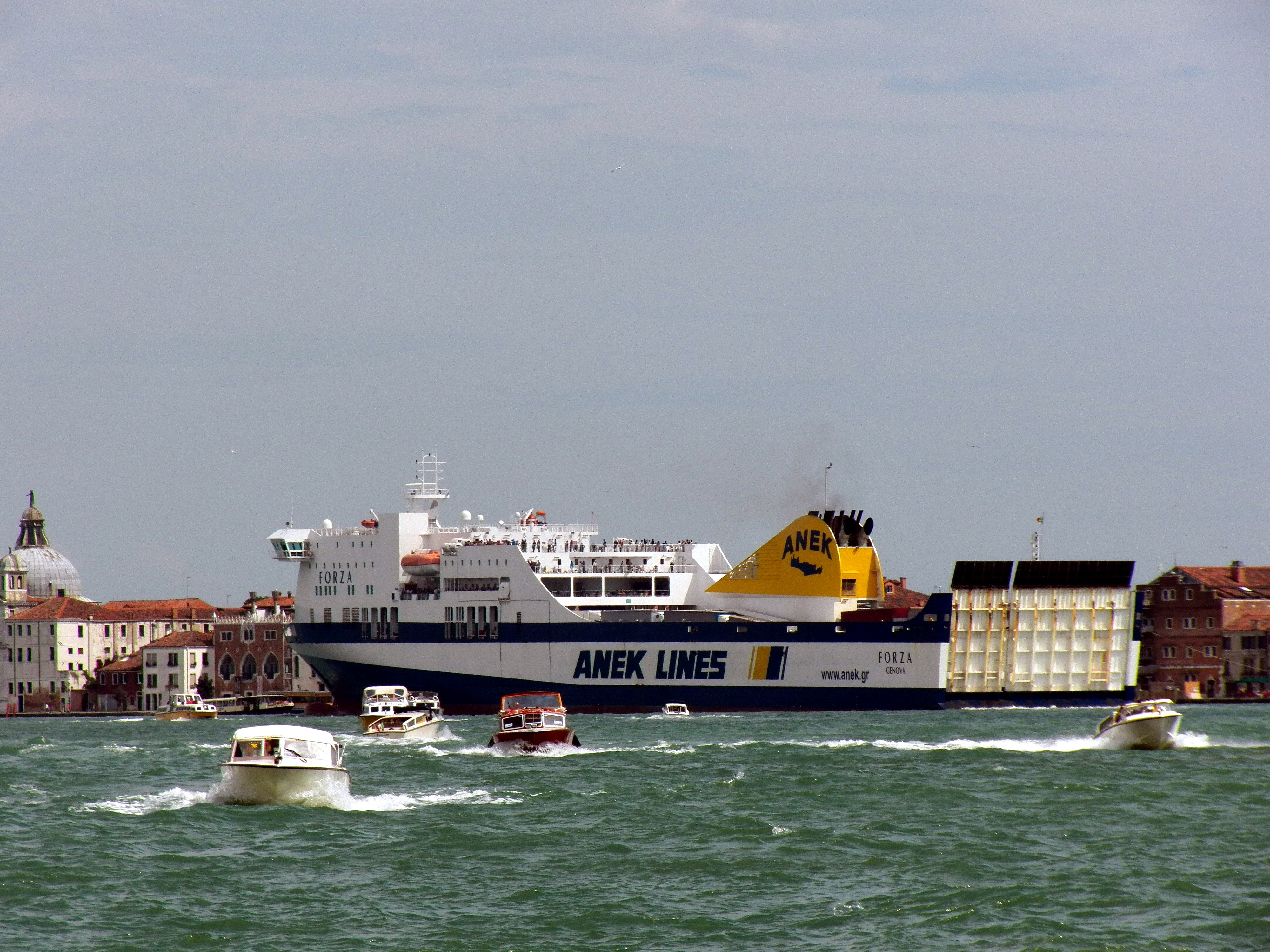 Transporteur dans le canal de la Giudecca.